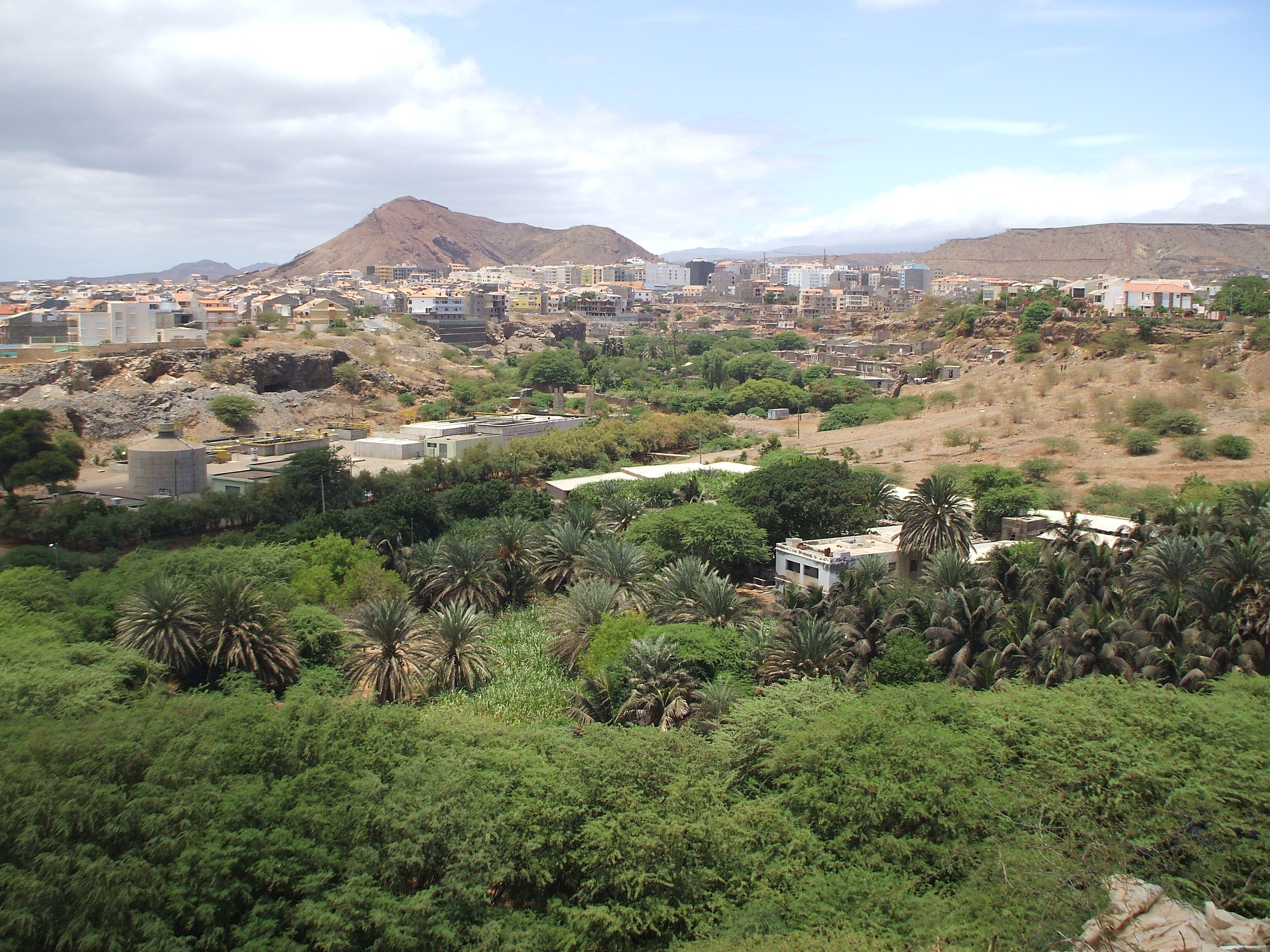 View over Ribeira de Palmarejo, in Praia